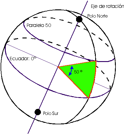 Esquema del concepto de latitud.